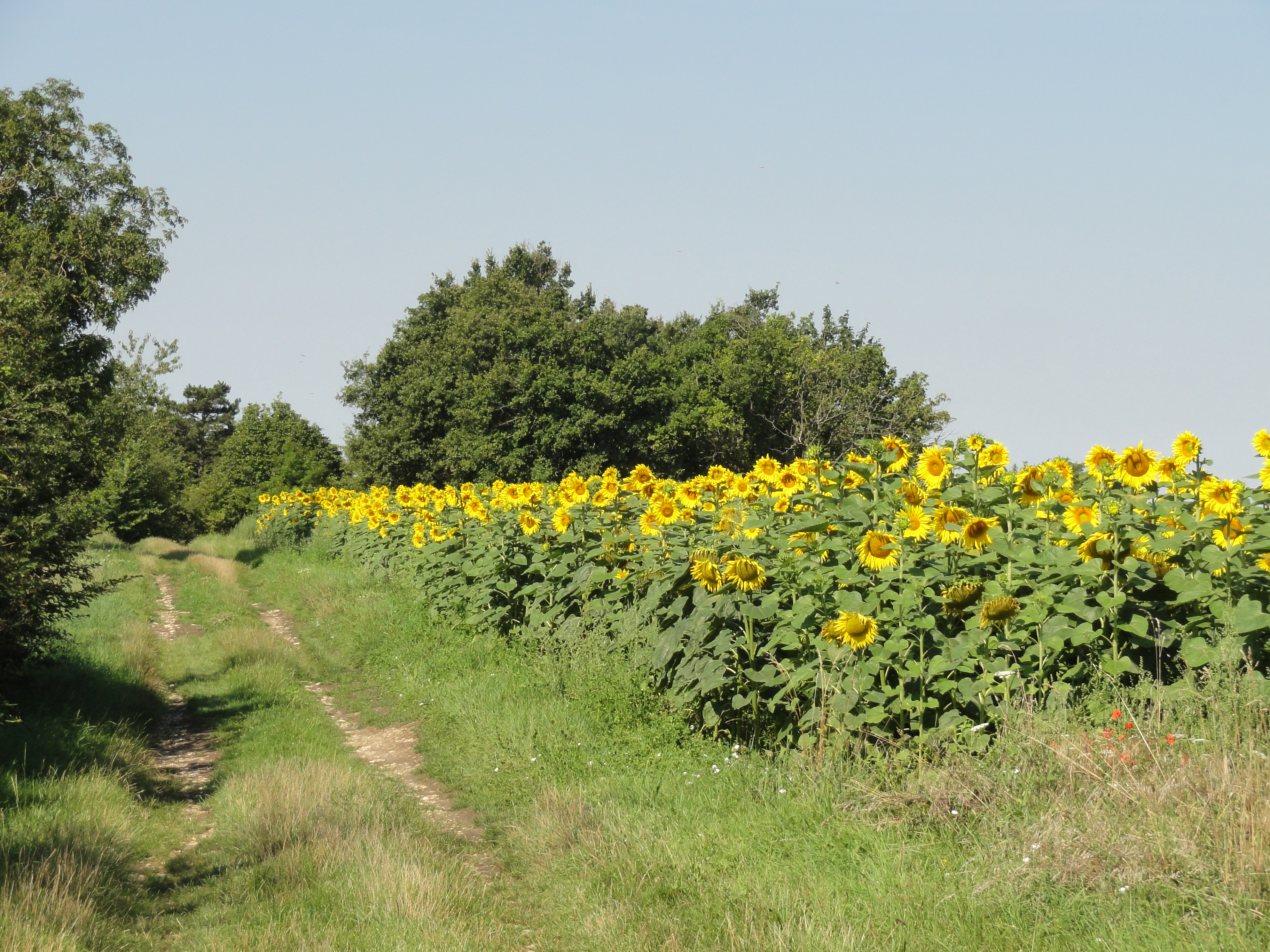 Champ de tournesols, sur le GR 13 à l'est de la ville.